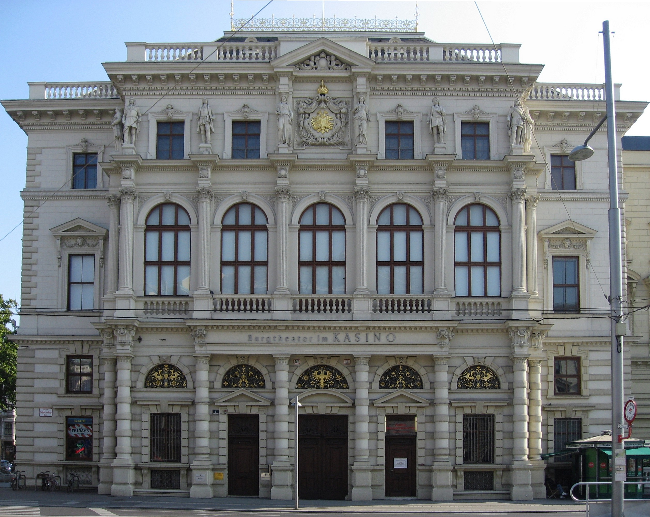 Wien, Palais Erzherzog Ludwig Viktor